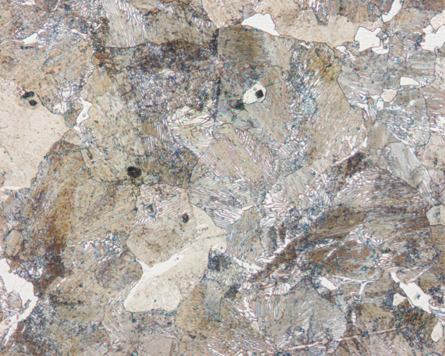 Untereutektoider Stahl mit 0,7% C, V=500:1 (perlitisch)